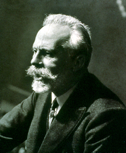 Pablo Iglesias Imaxes de personalidades da política de Galicia